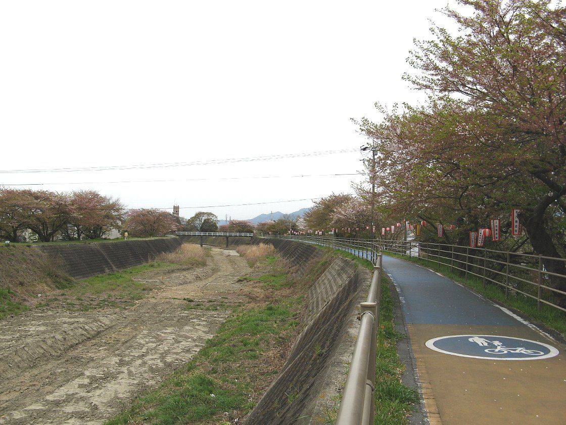 旧ja:草津川 河道跡 追分付近で東望